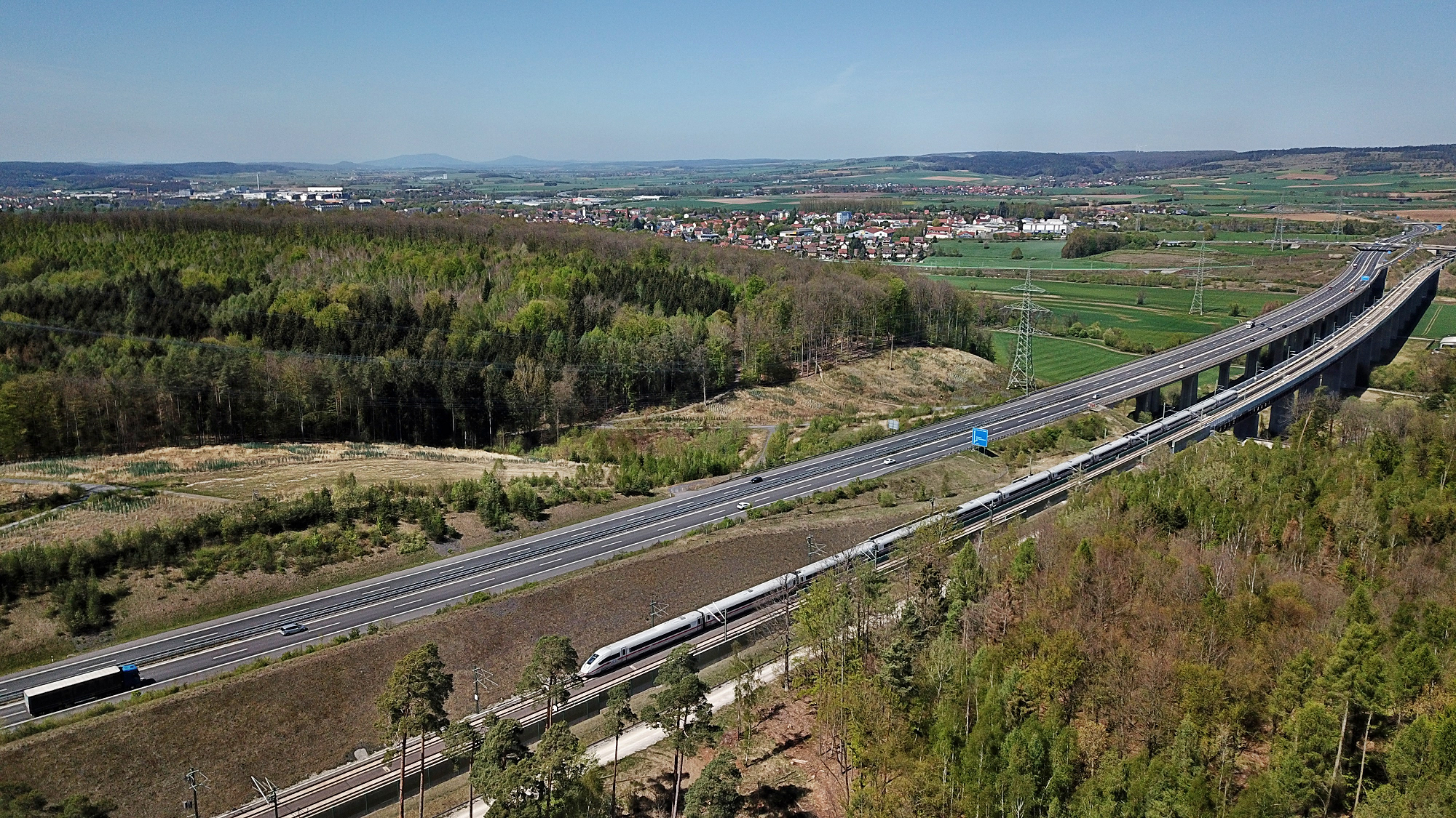 Verkehrswegebündelung im Abschnitt der Itztalbrücken (rechts) zwischen Rödental und Dörfles-Esbach (Siedlungsgebiet im Hintergrund) im Landkreis Coburg. Zu sehen sind die Autobahn 73 und die Schnellfahrstrecke Nürnberg–Erfurt, daneben außerdem Masten der Thüringer Strombrücke.